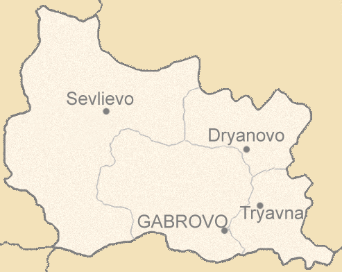 Gabrovo obsalt map